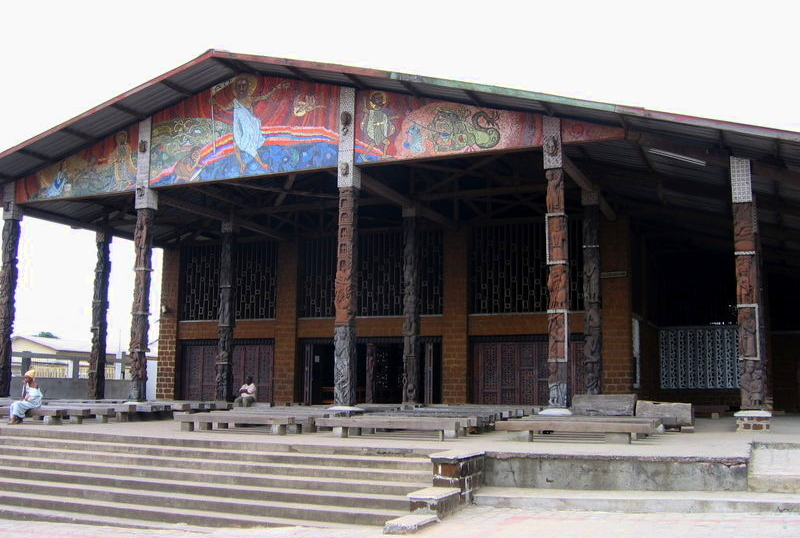 Eglise Saint Michel de Nkembo, Libreville, Gabon